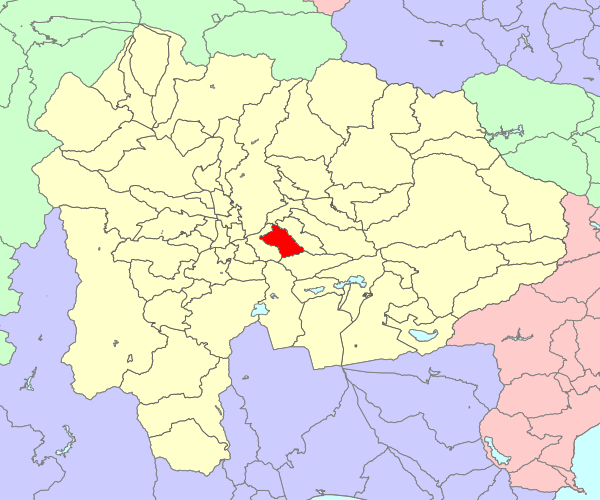 山梨県東八代郡境川村の位置画像。